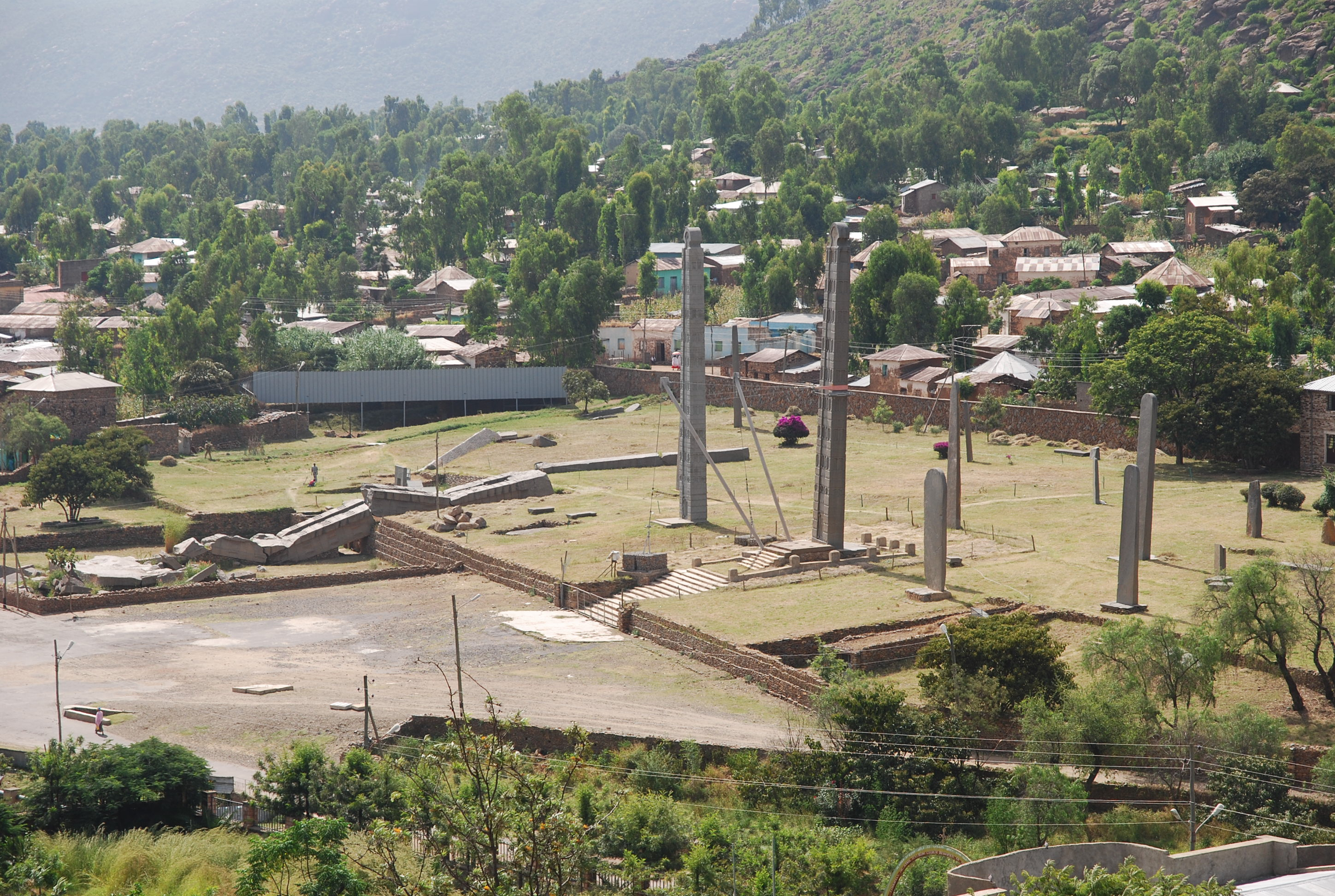 Stelenpark mit der aus Italien rückgeführten Stele 2 sowie Stele 3 mit Sicherung gegen Umstürzen